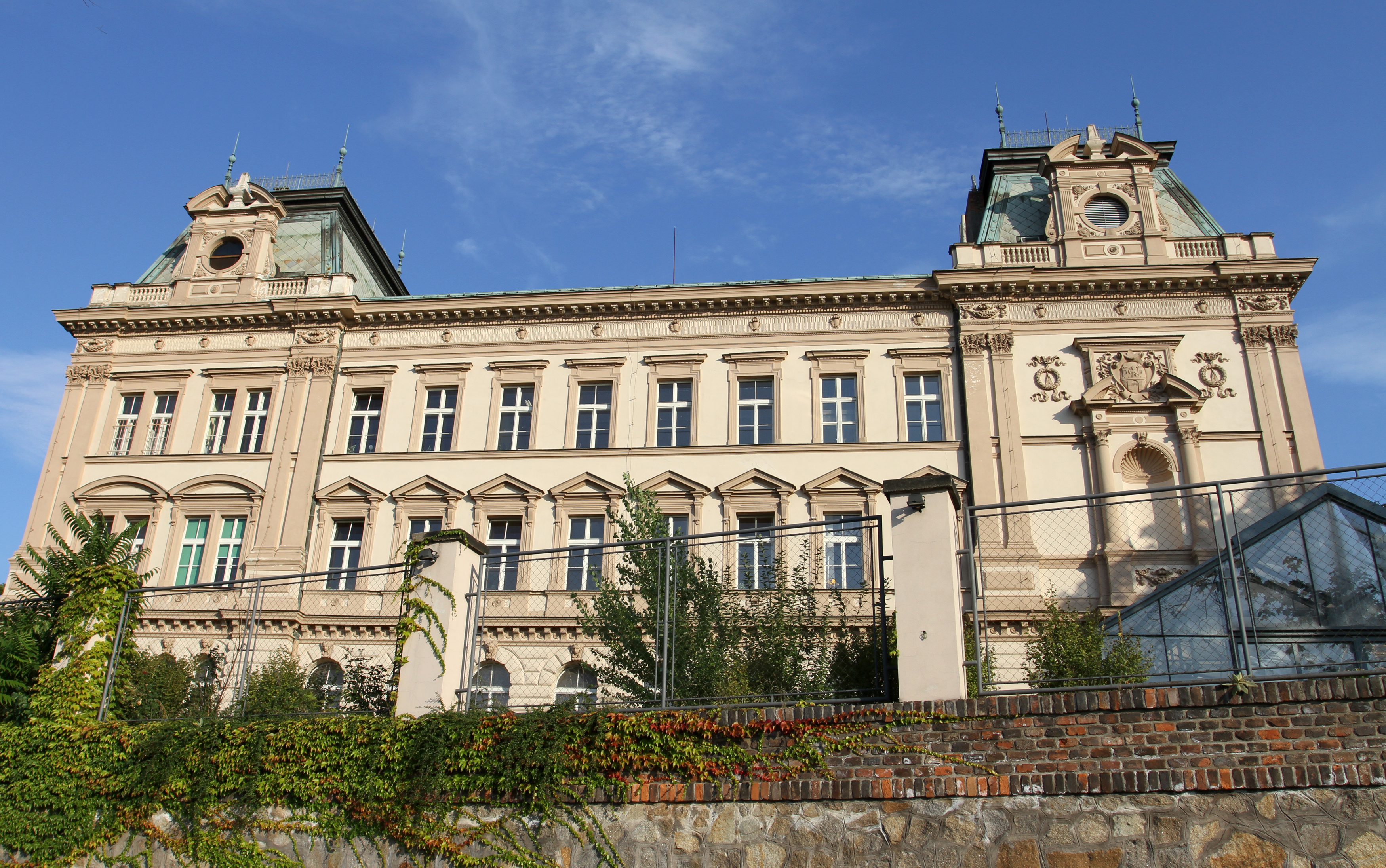 Základní škola Na Smetance(Vinohrady), Praha 2, Na Smetance 505/1, Vinohrady